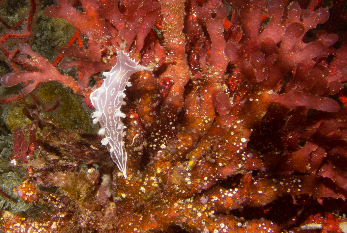 Tritonia festiva